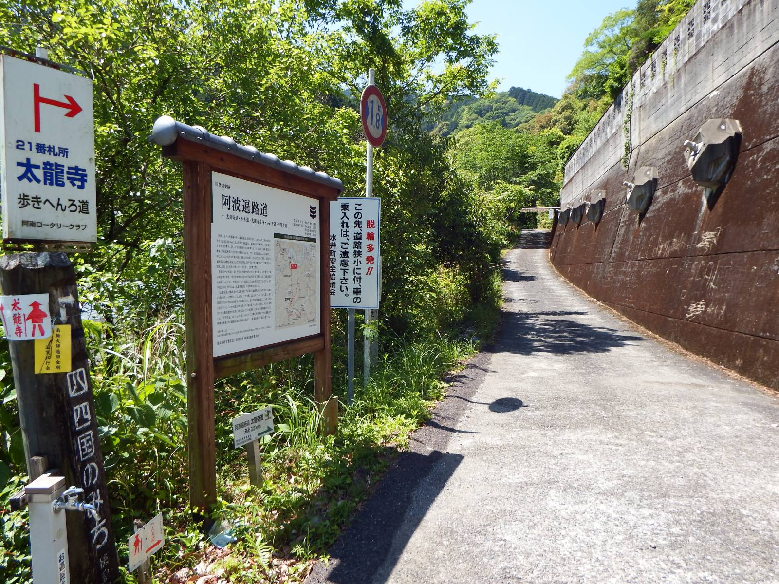 阿波遍路道 太龍寺道の後半の最初